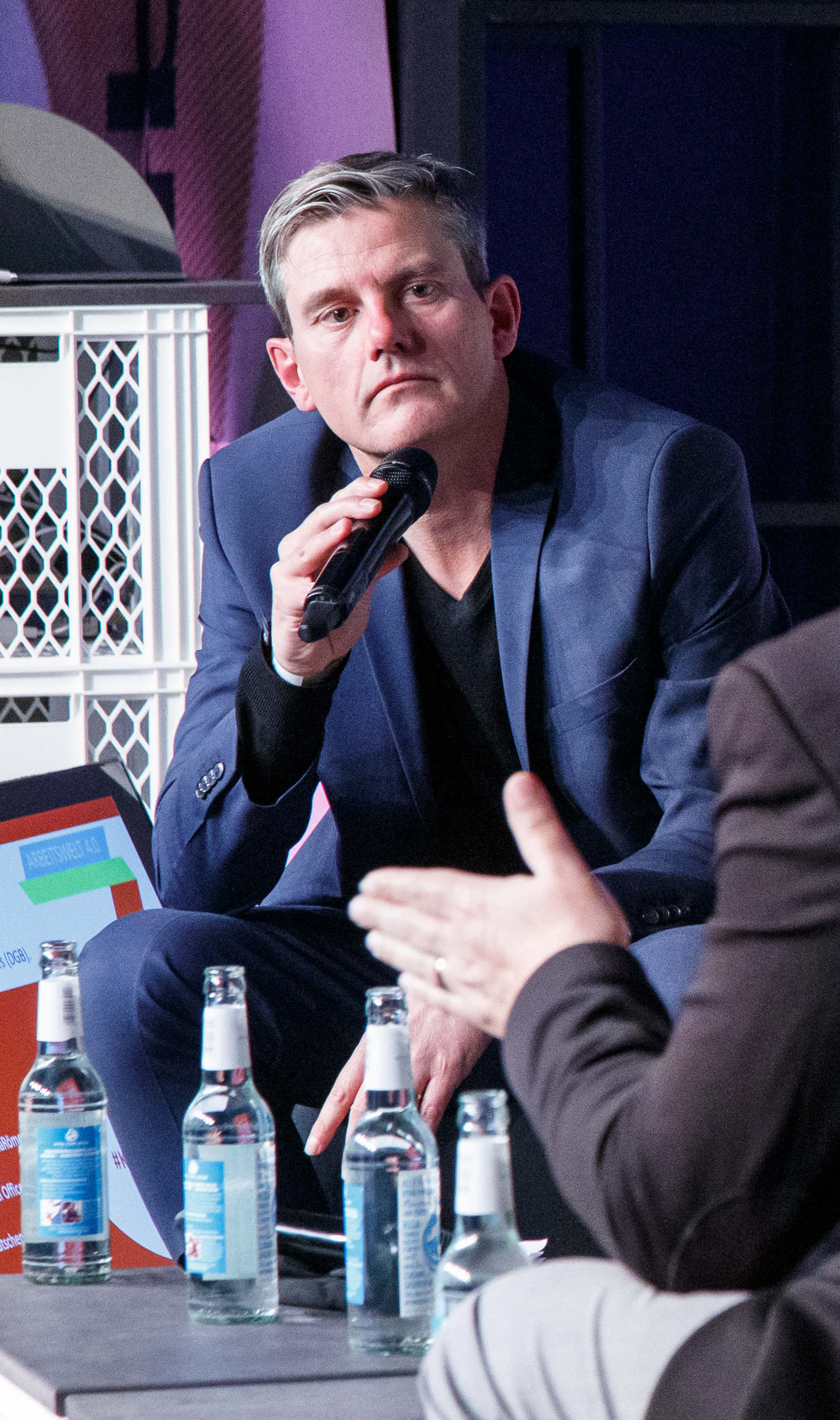 Discussion: "Bei uns heißt Siri Mary" - KI macht Arbeit Speaker: Katrin Suder, Efstathios Michailidis , Reiner Hoffmann, Anna Kopp,Thomas Ramge